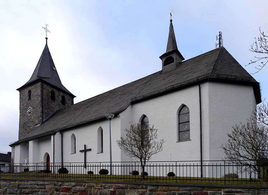 Kirche St. Antonius Einsiedler in Grevenstein, erbaut 1327